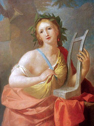 Caliope